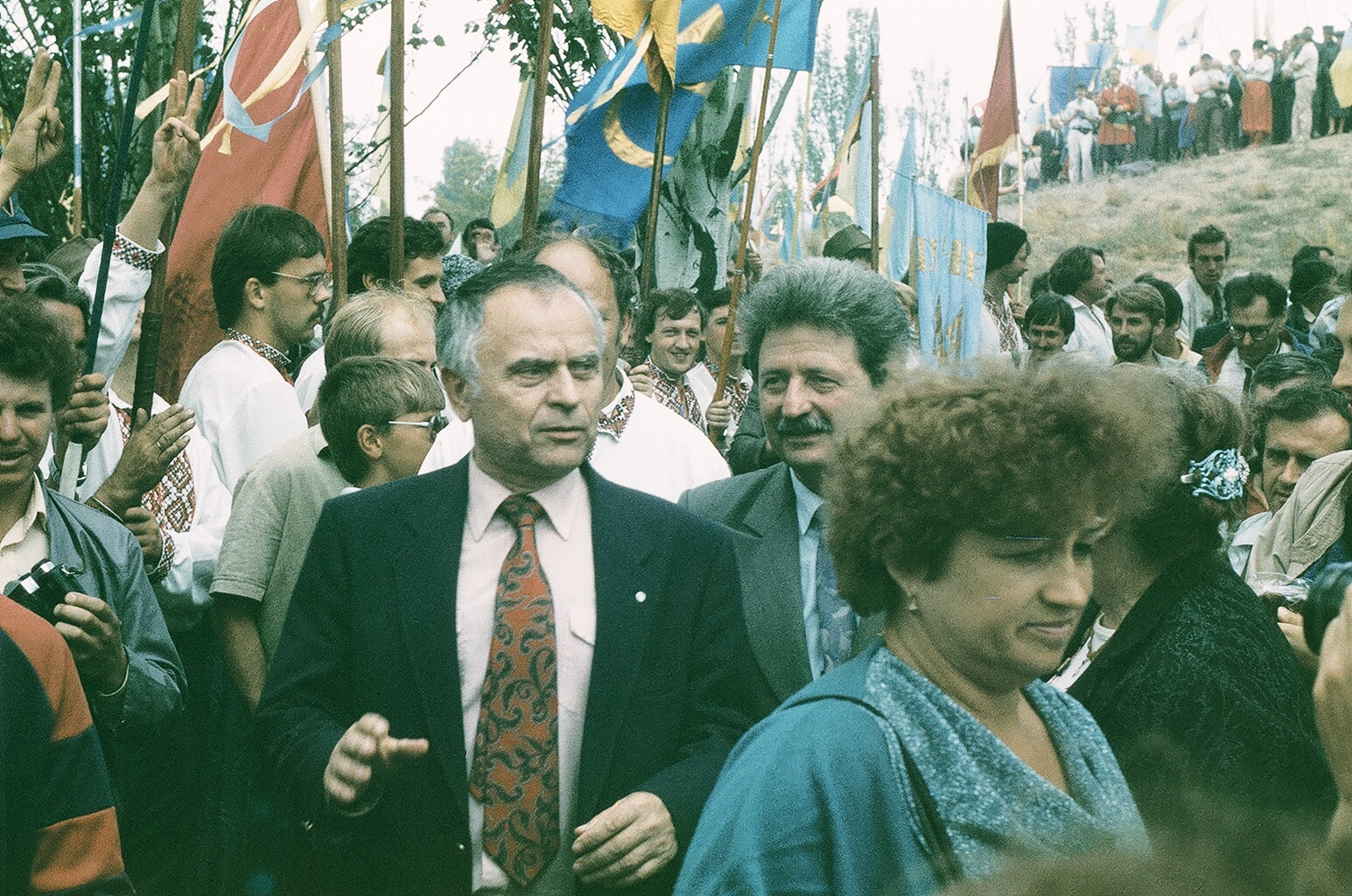 500 років Українському козацтву. 1990.: фото